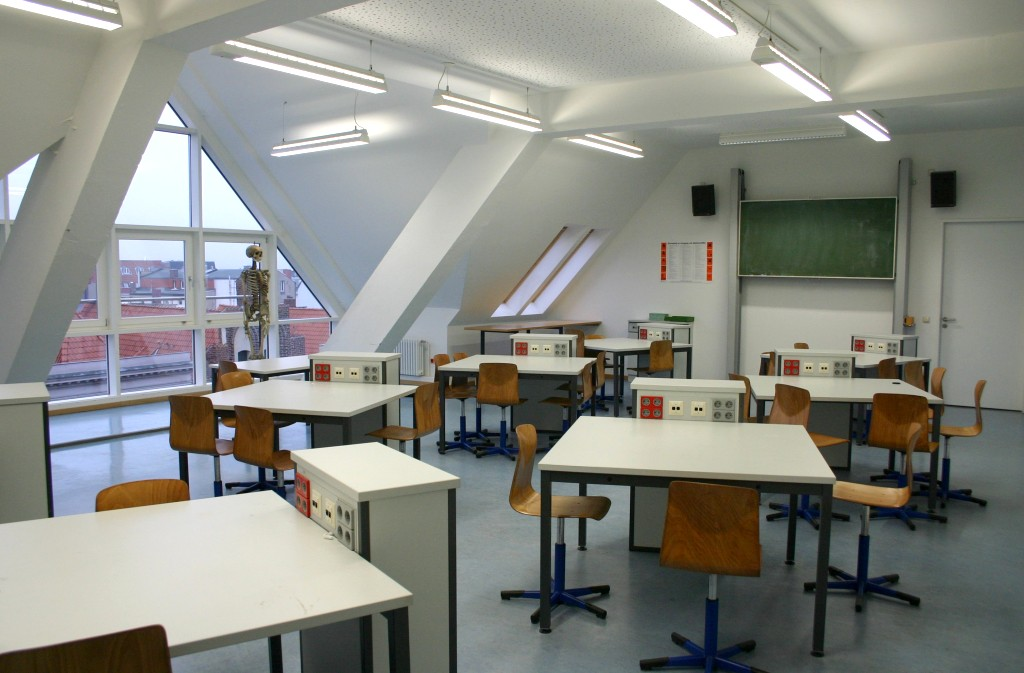 Biologieraum im Katharineum zu Lübeck, eigene Aufnahme 2006